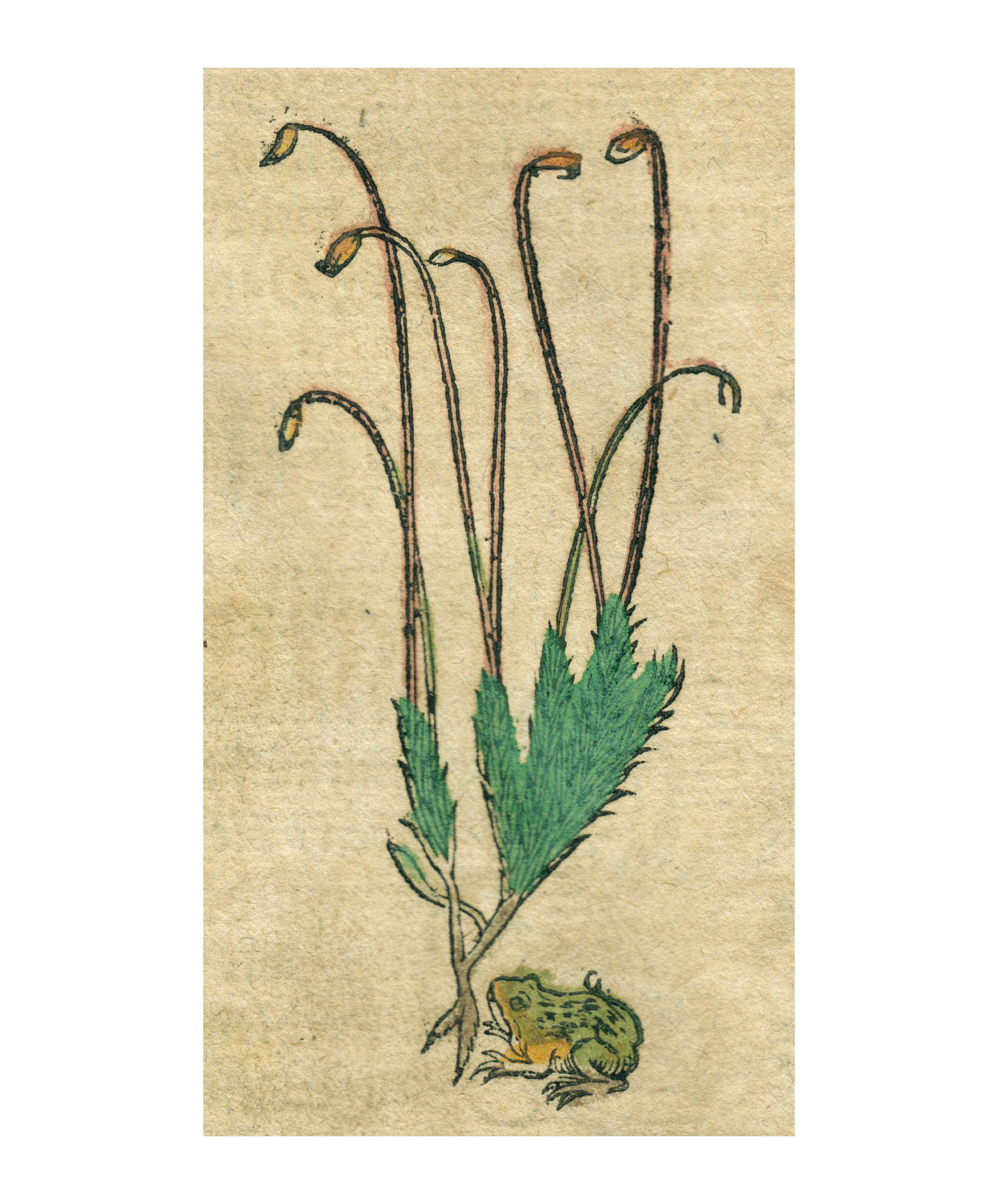 Abbildung von Polytrichum